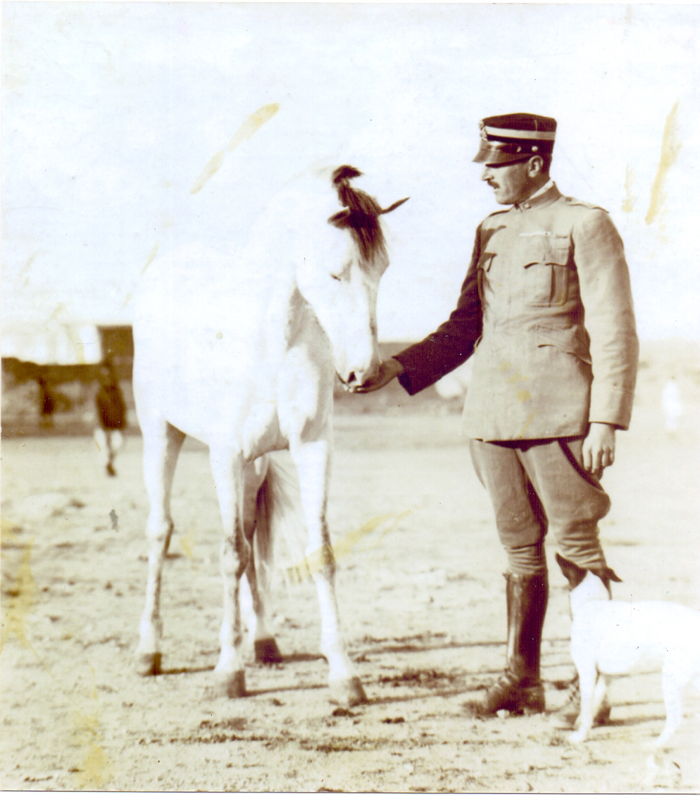 Il magg. Mignone con la sua cavallina della quale parlava nelle sue lettere inviate dal fronte alla madre